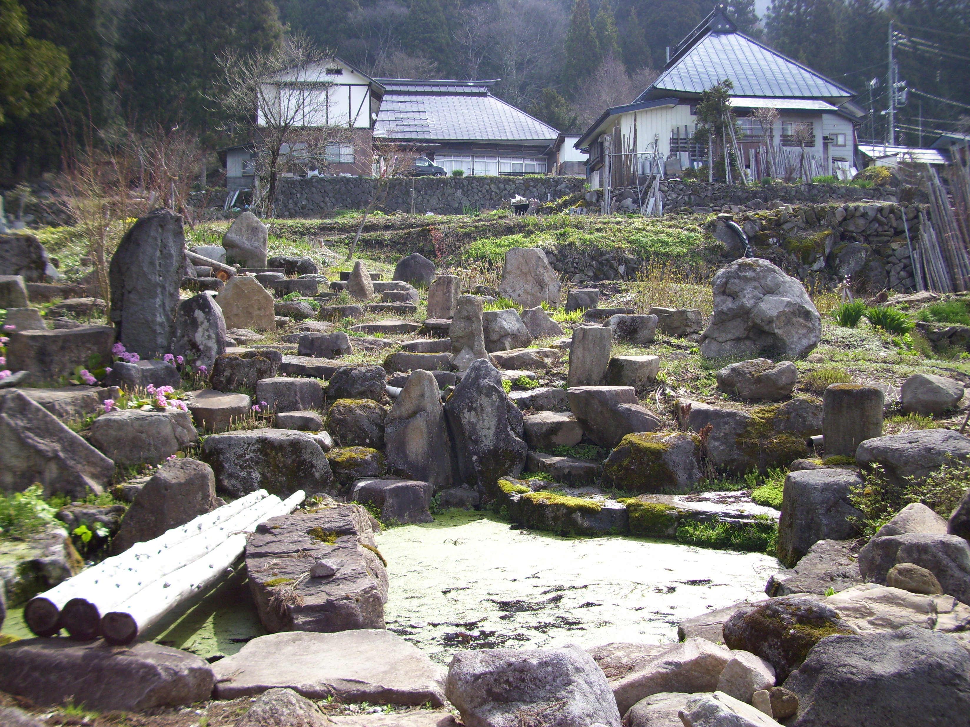 重要文化的景観「小菅の里および小菅山の文化的景観」：小菅集落